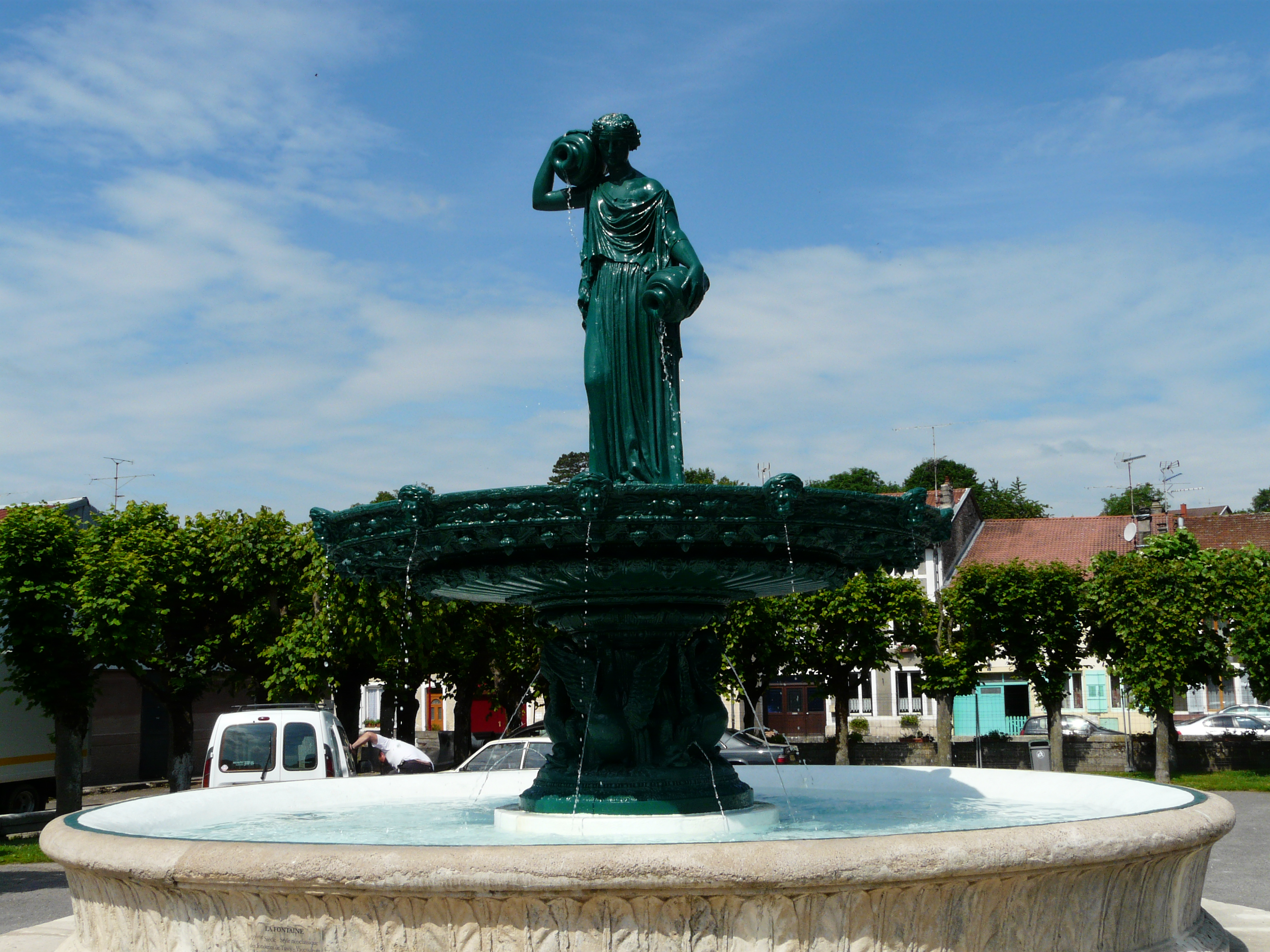 La fontaine de la place Cugnot à Void-vacon (Meuse, France) Les deux urnes symbolisent la rencontre de la Meuse et de son affluent la Méholle